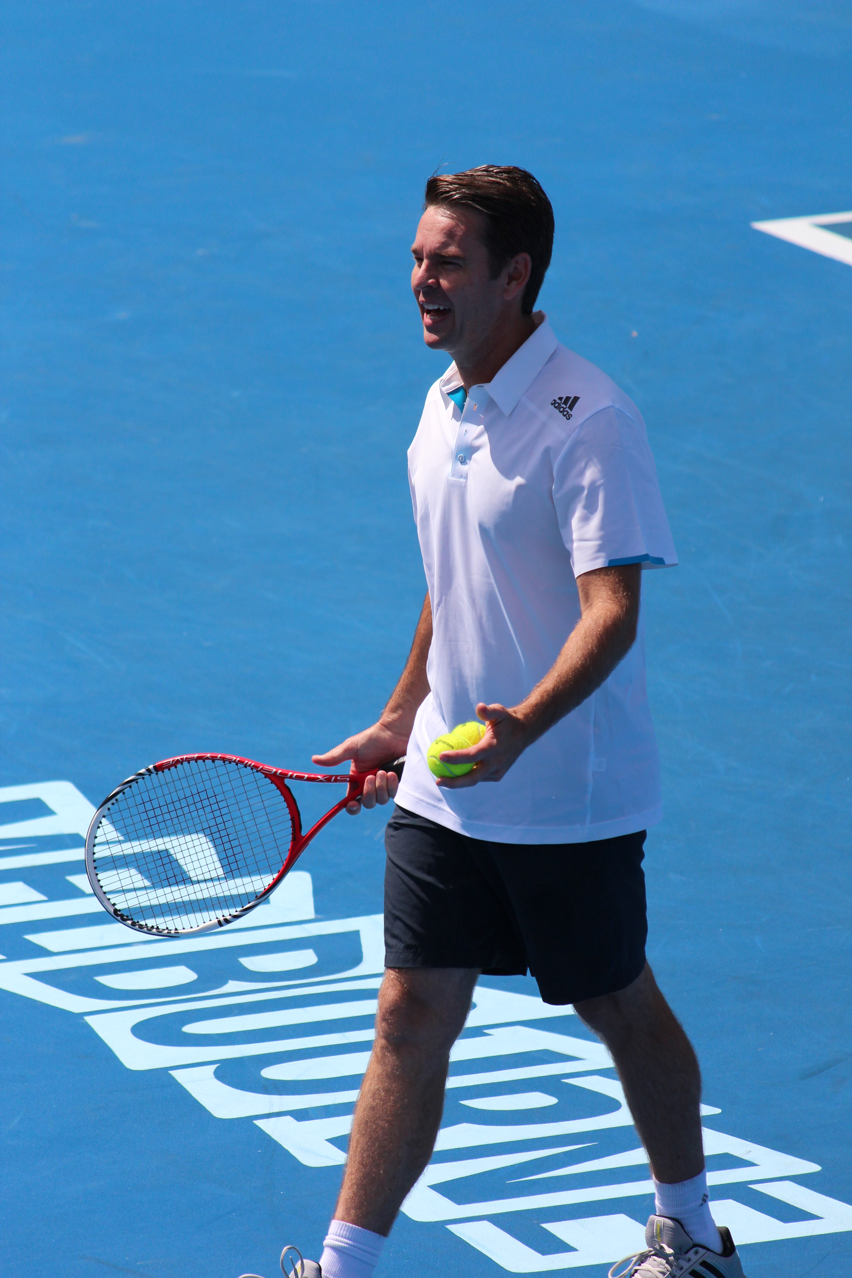 Todd Woodbridge